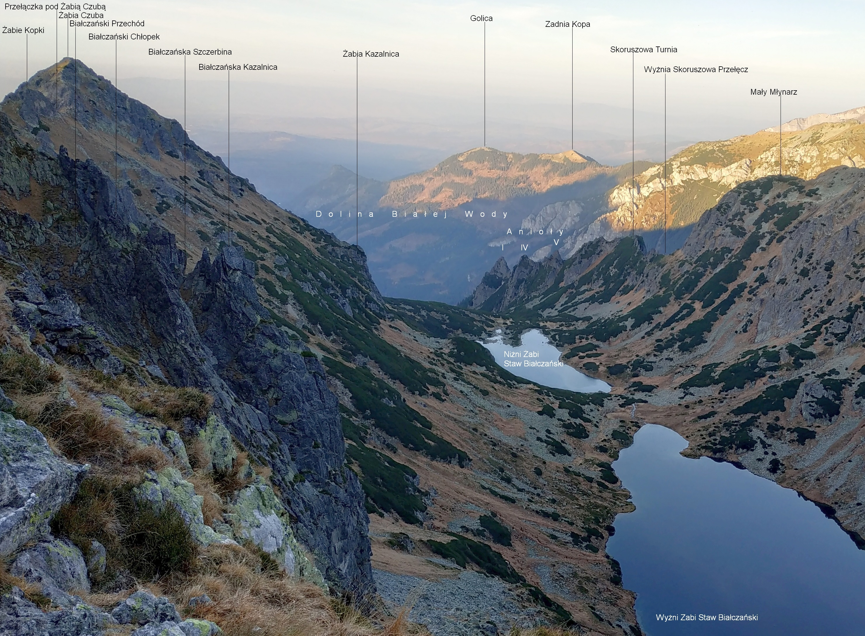 Dolina Żabich Stawów Białczańskich